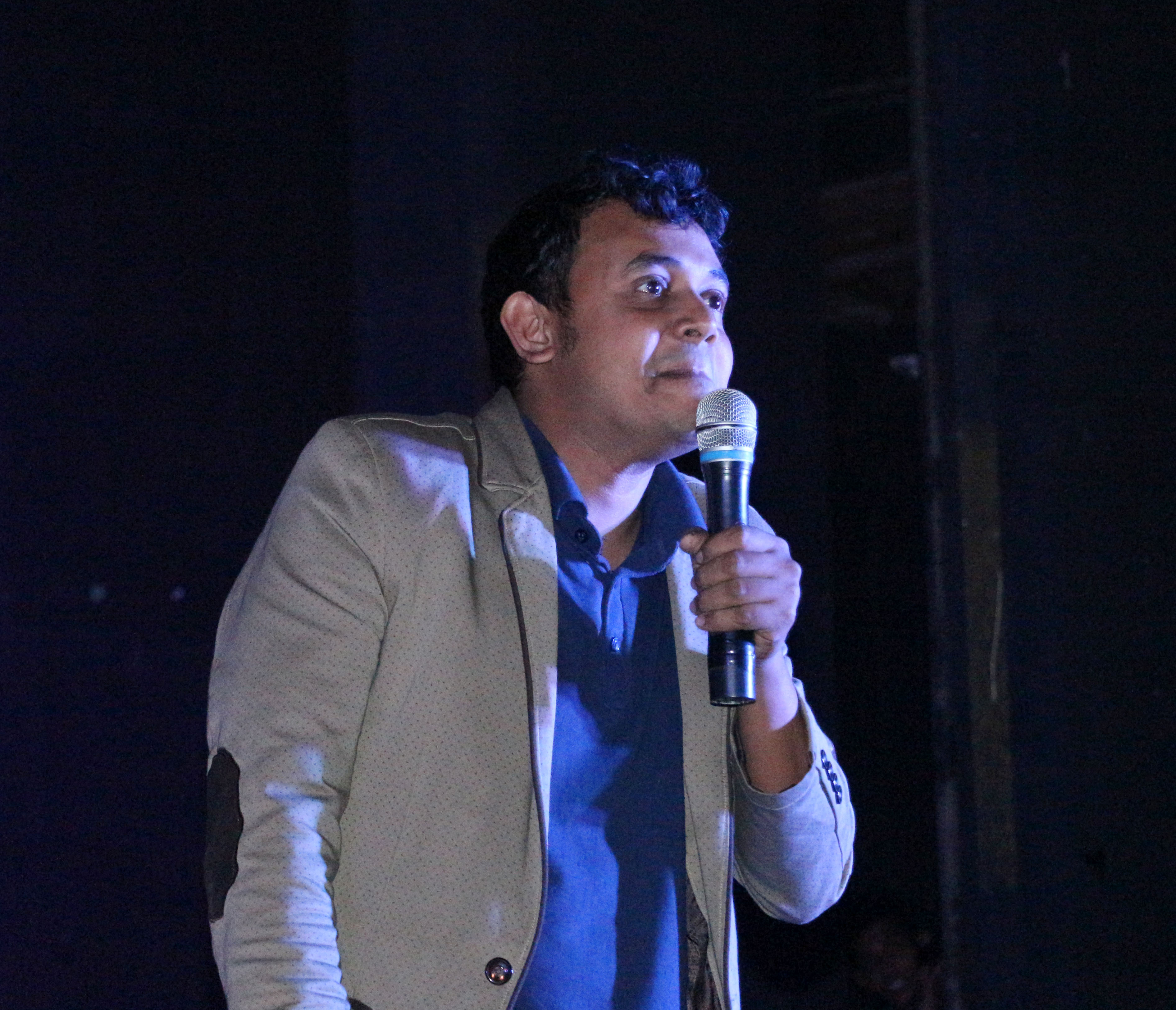 বাংলাদেশী স্ট্যান্ড-আপ কমেডিয়ান